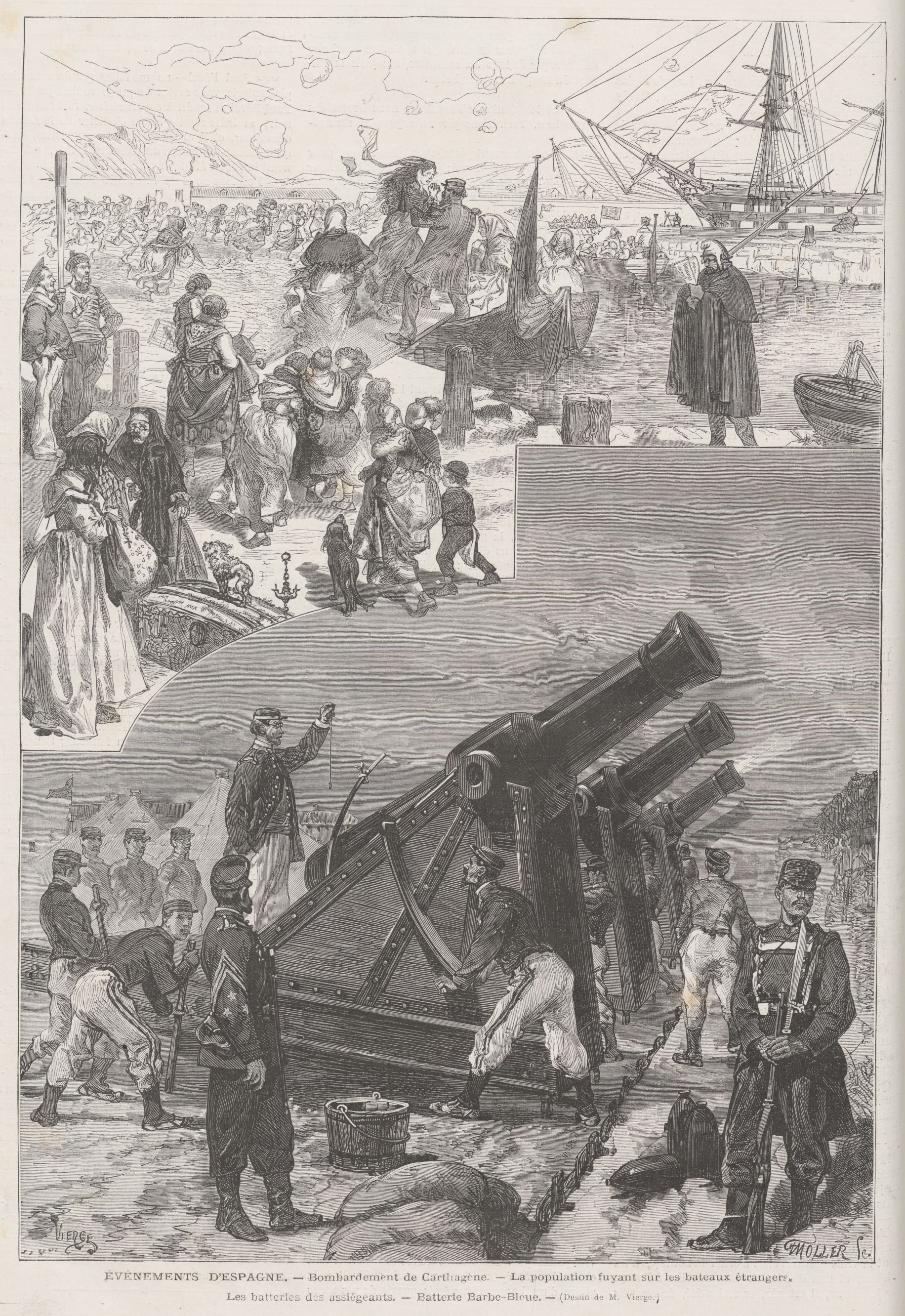 Événements d'Espagne. — Bombardement de Carthagéne. — La population fuyant sur les bateaux étrangers. — Les batteries des assiégeants. — Batterie Barbe-Bleue. — (Dessin de M. Vierge)